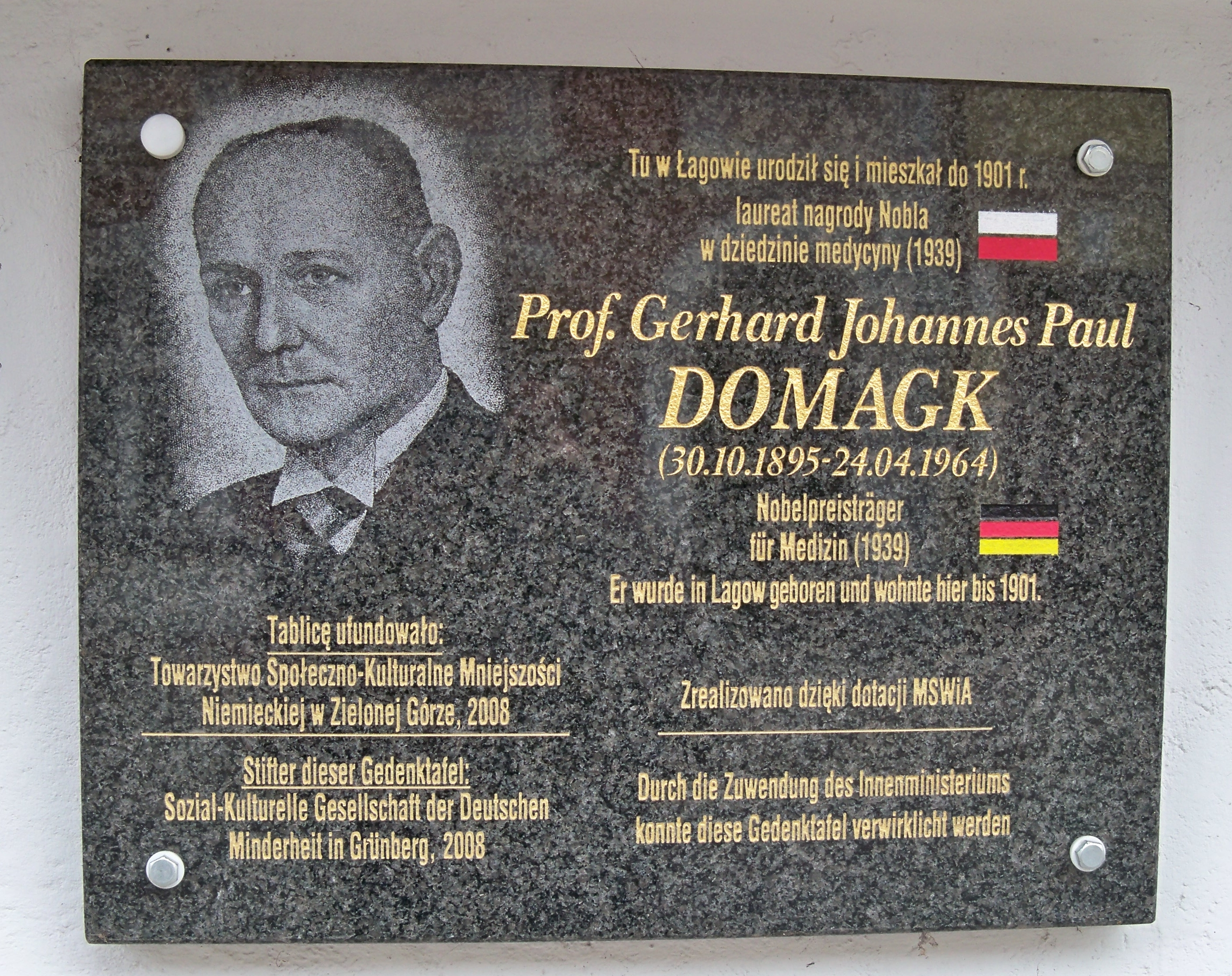 Tablica na budynku informacji turystycznej w Łagowie Lubuskim poświęcona G. Domagkowi